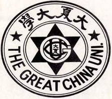 大夏大学校徽